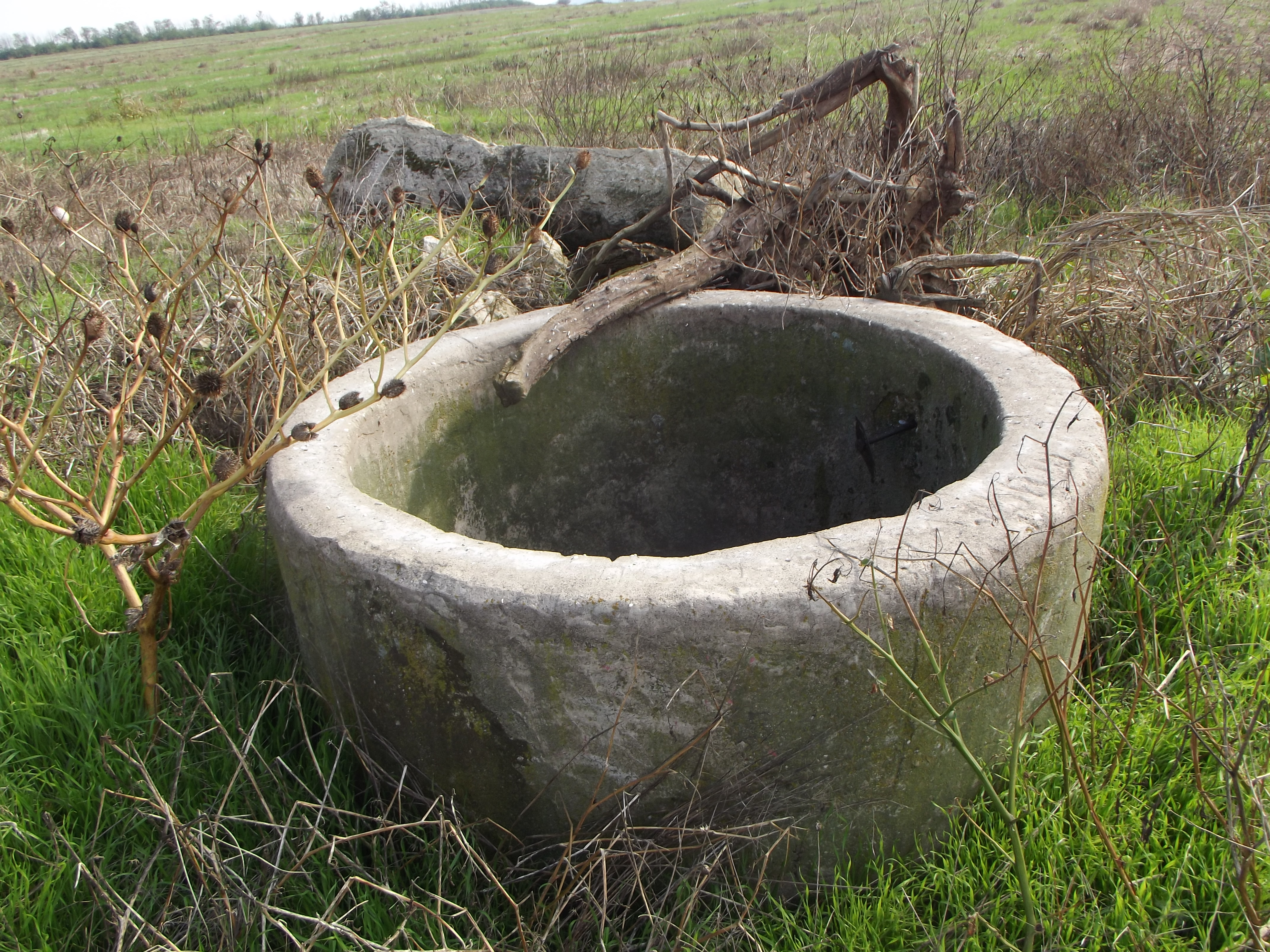 Кладенец в местността Голям брег, Ново село, Видинско